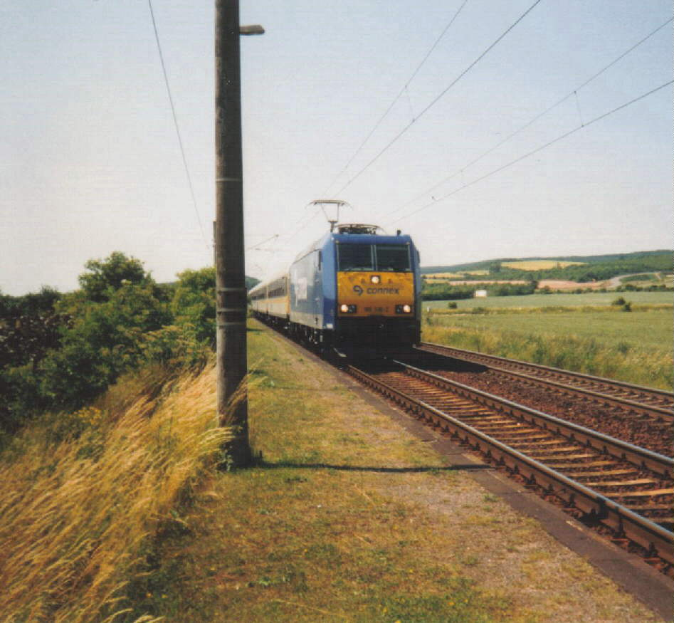 Der inzwischen wieder eingestellte InterConneX von Köln nach Rostock am 25. Juni 2003 bei der Fahrt durch Bennungen. Aufnahme: Steffen Mokosch Lizenz: GNU FDL